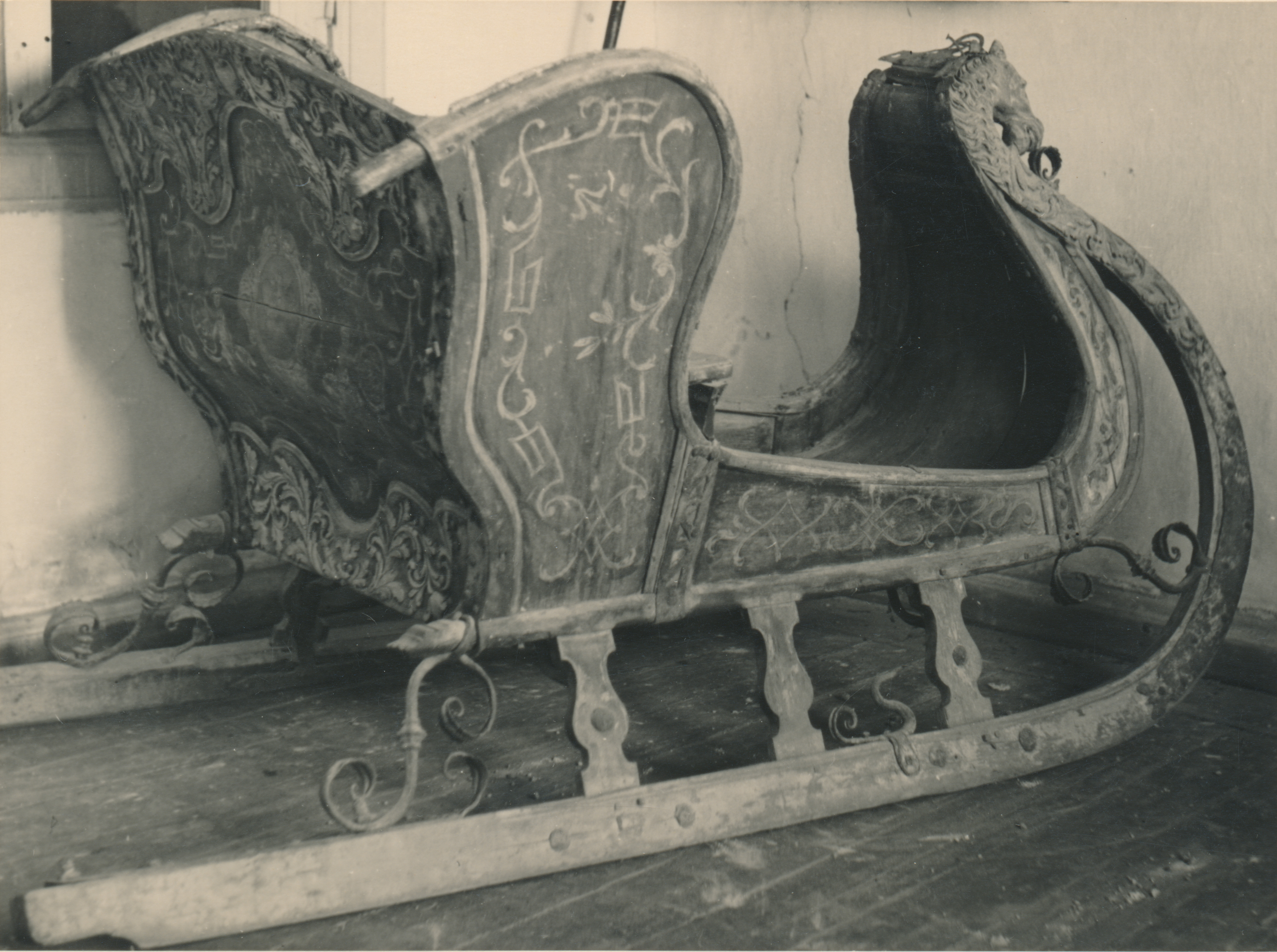 Saan Narvas